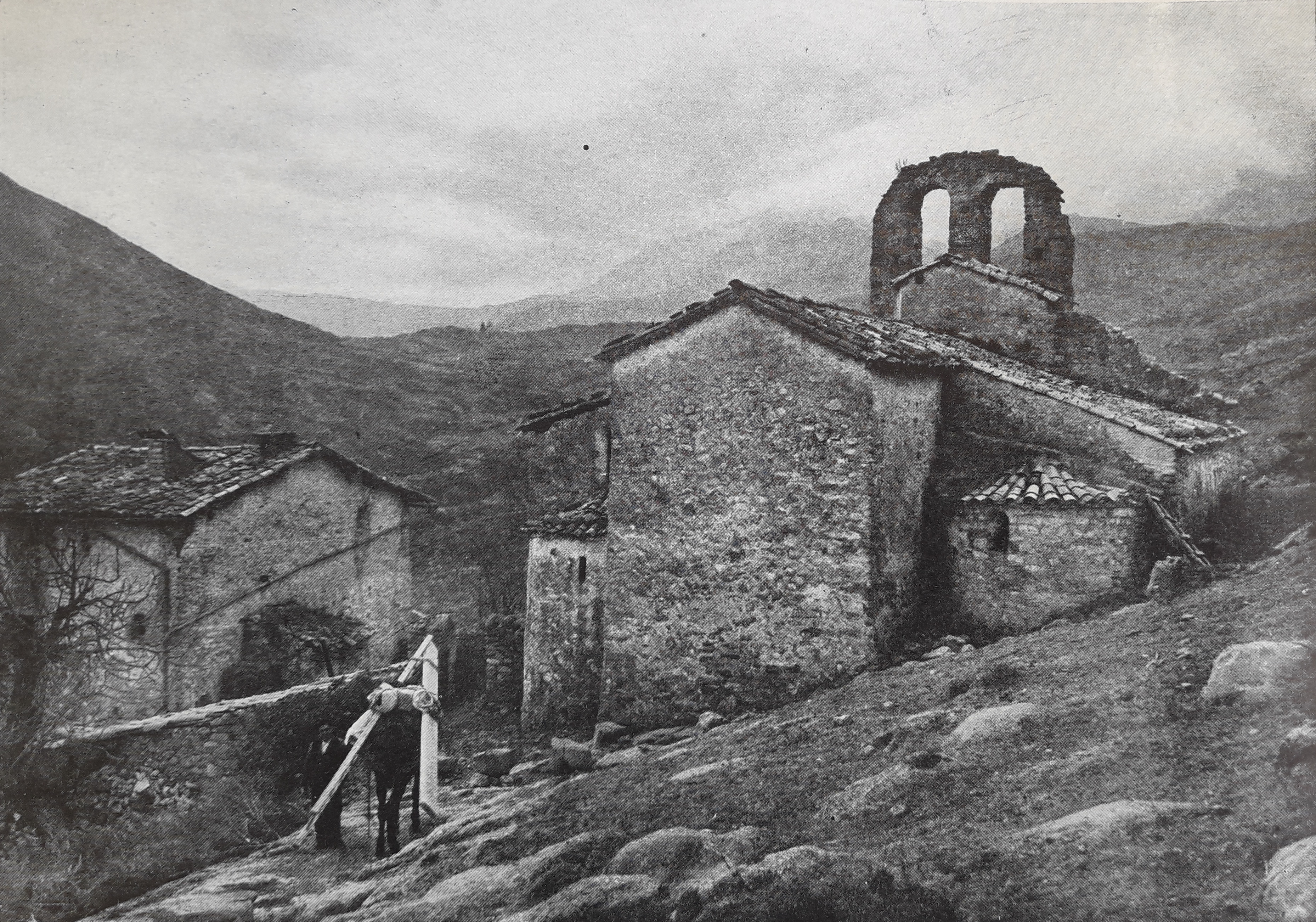 Església de Sant Quirze de Pedret a finals dels anys 1930s, començaments 1940s